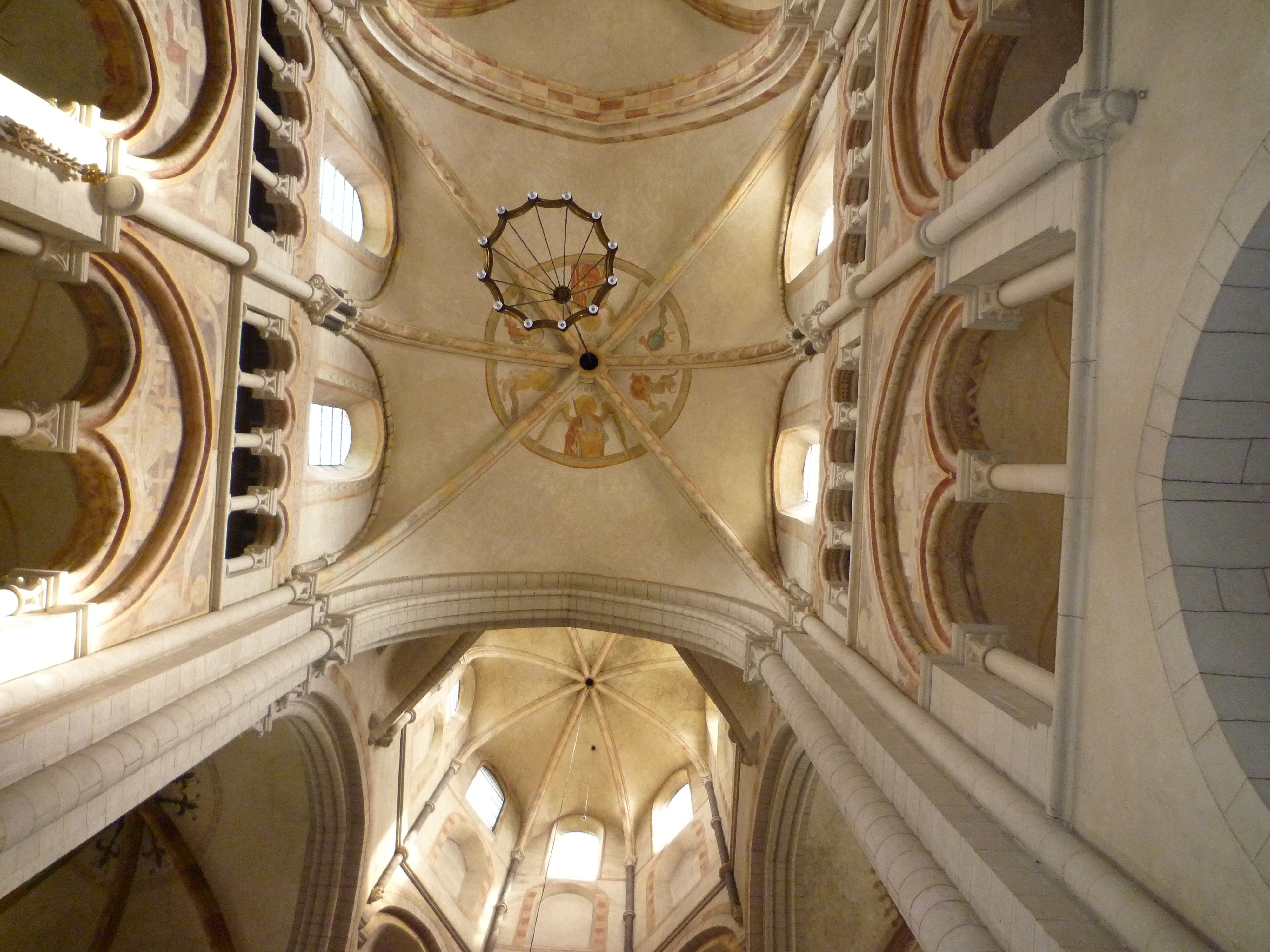 Limburg - Kuppel des Domes.jpg